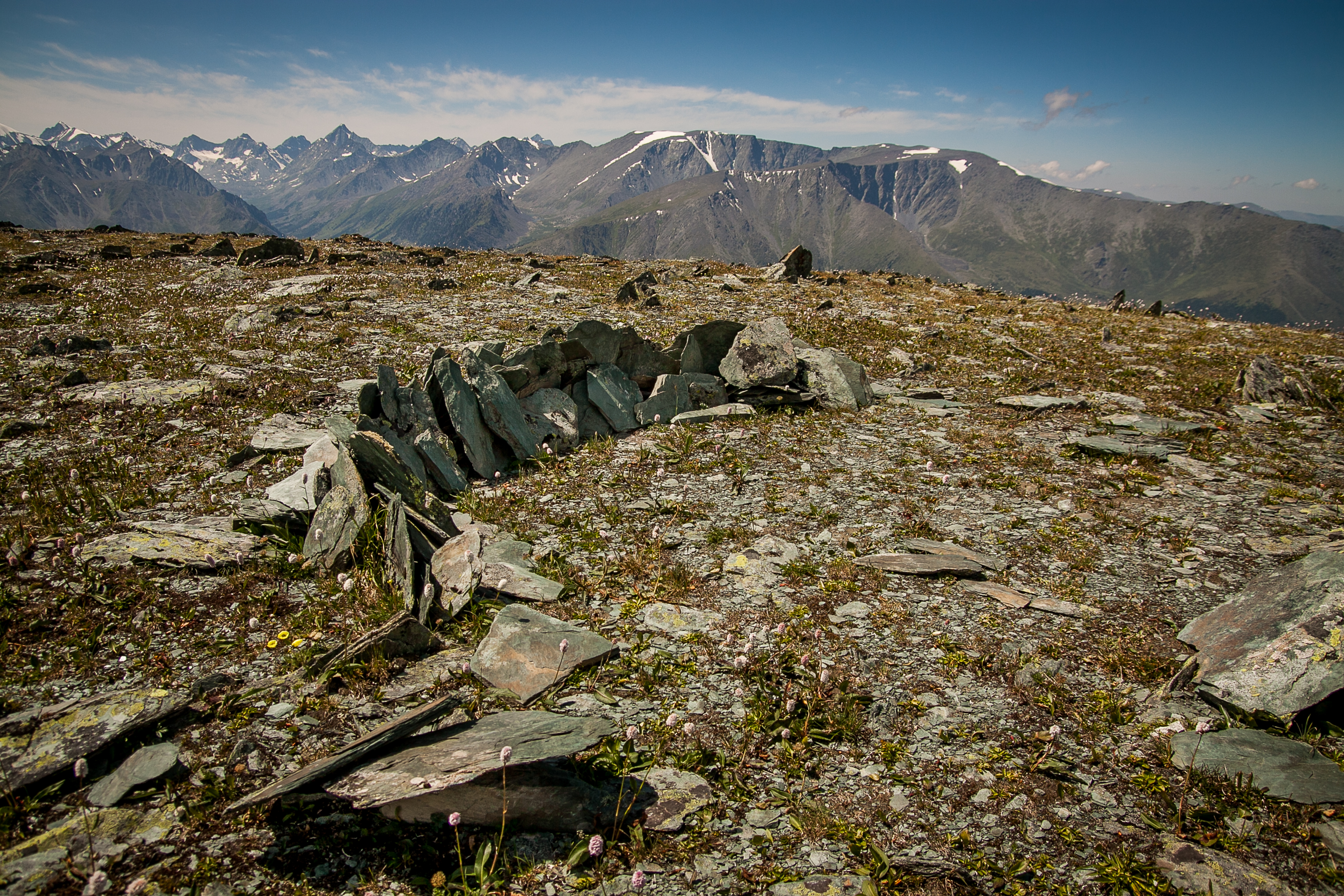 Катунский заповедник: Усть-Коксинский район, Алтай This image is related to the protected area of Russia number 0400042